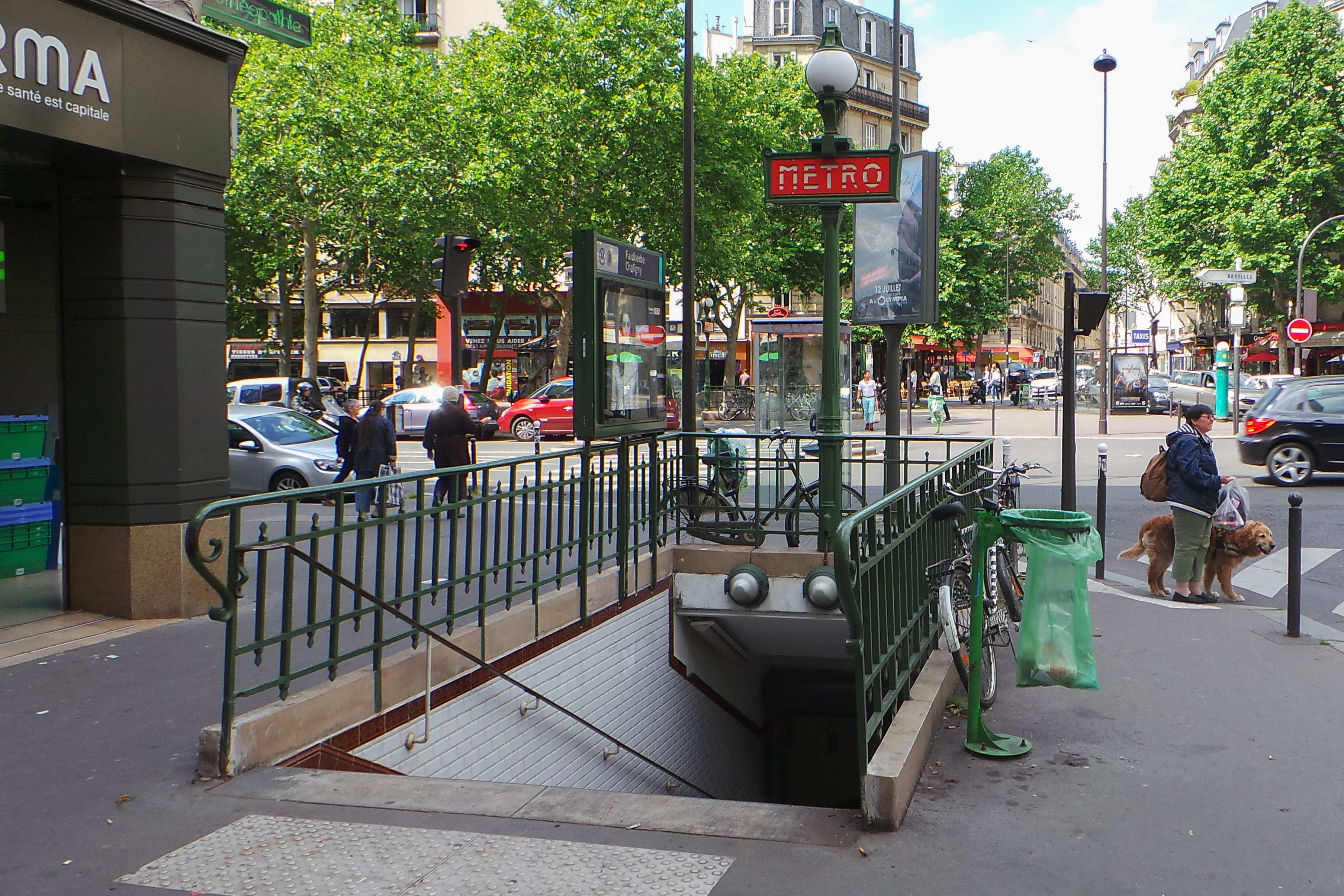 Station de métro Faidherbe - Chaligny, métro de Paris ligne 8, Paris, France